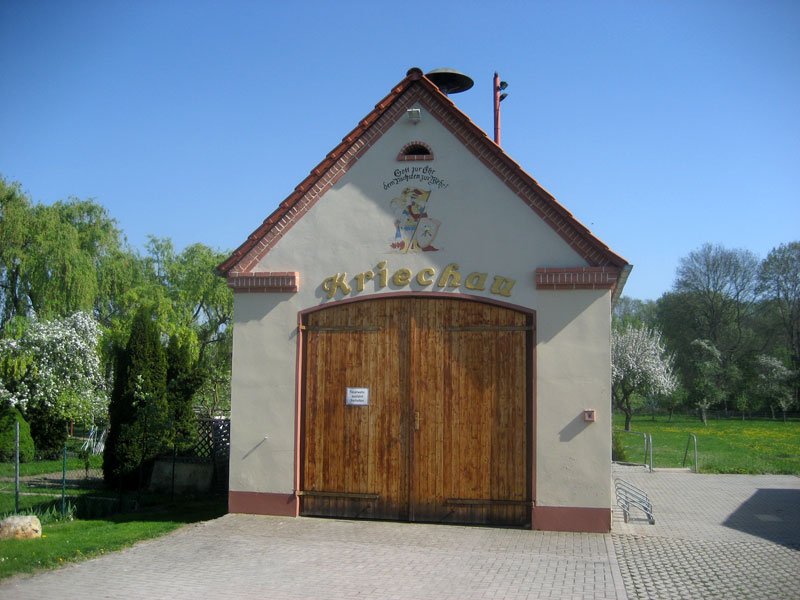 Gebäude der Feuerwehr in Kriechau bei Weißenfels.